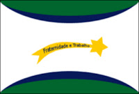 Bandeira de Amorinópolis, Goiás, Brasil.